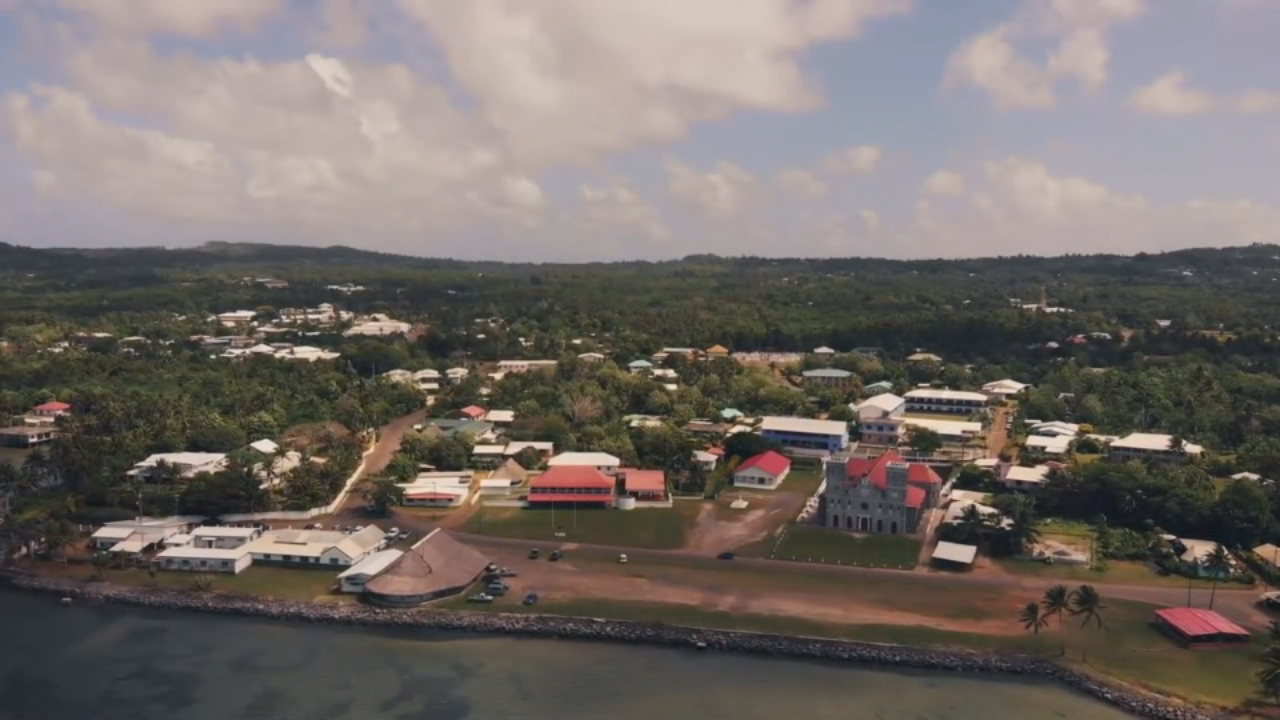 Le village de Mata-Utu (sur l'île de Wallis, Wallis et Futuna) vu depuis un drone. La cathédrale et le palais royal sont visibles au centre, ainsi que diverses habitations. Au premier plan, le lagon